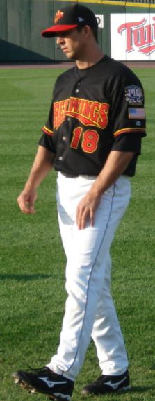 Chris Başak 06:19, 9 June 2008 . . Phil5329 . . 223×578 (23 KB)